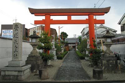 Sudo-Tenno-Sha, Nara (奈良市西紀寺町 崇道天皇社)